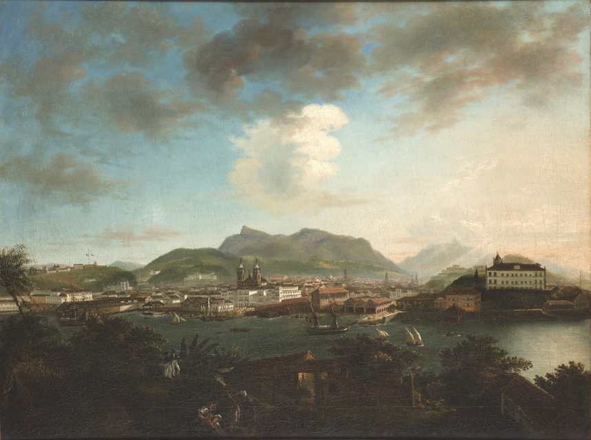 Detalhes Título: RIO DE JANEIRO VISTO DA ILHA DAS COBRAS Data: 1840 - 1845 Dimensões físicas: w119 x h84 centimeters Procedência: Casa Geyer/Museu Imperial/Ibram/Minc Tipo: Óleo sobre tela painter: August Muller